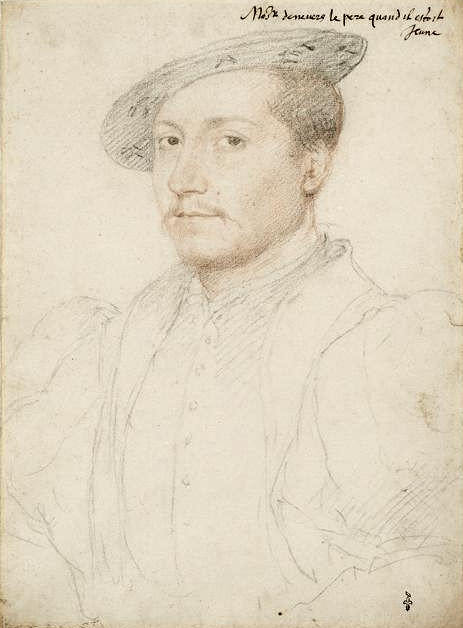 Porträt François I. de Clèves', Herzog von Nevers